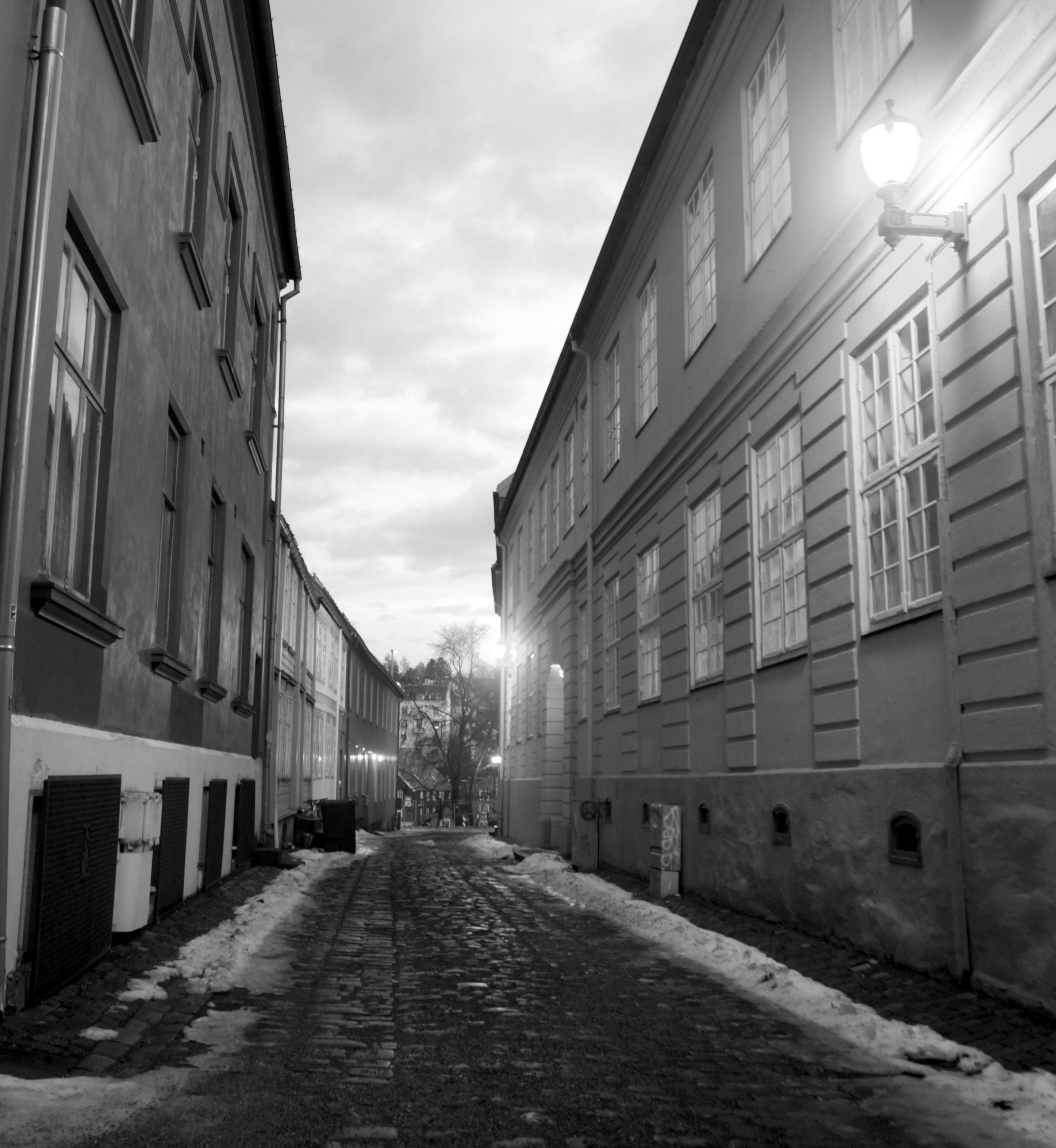 View of Kannikestrete, a "veit"(=narrow street) in Trondheim, Norway